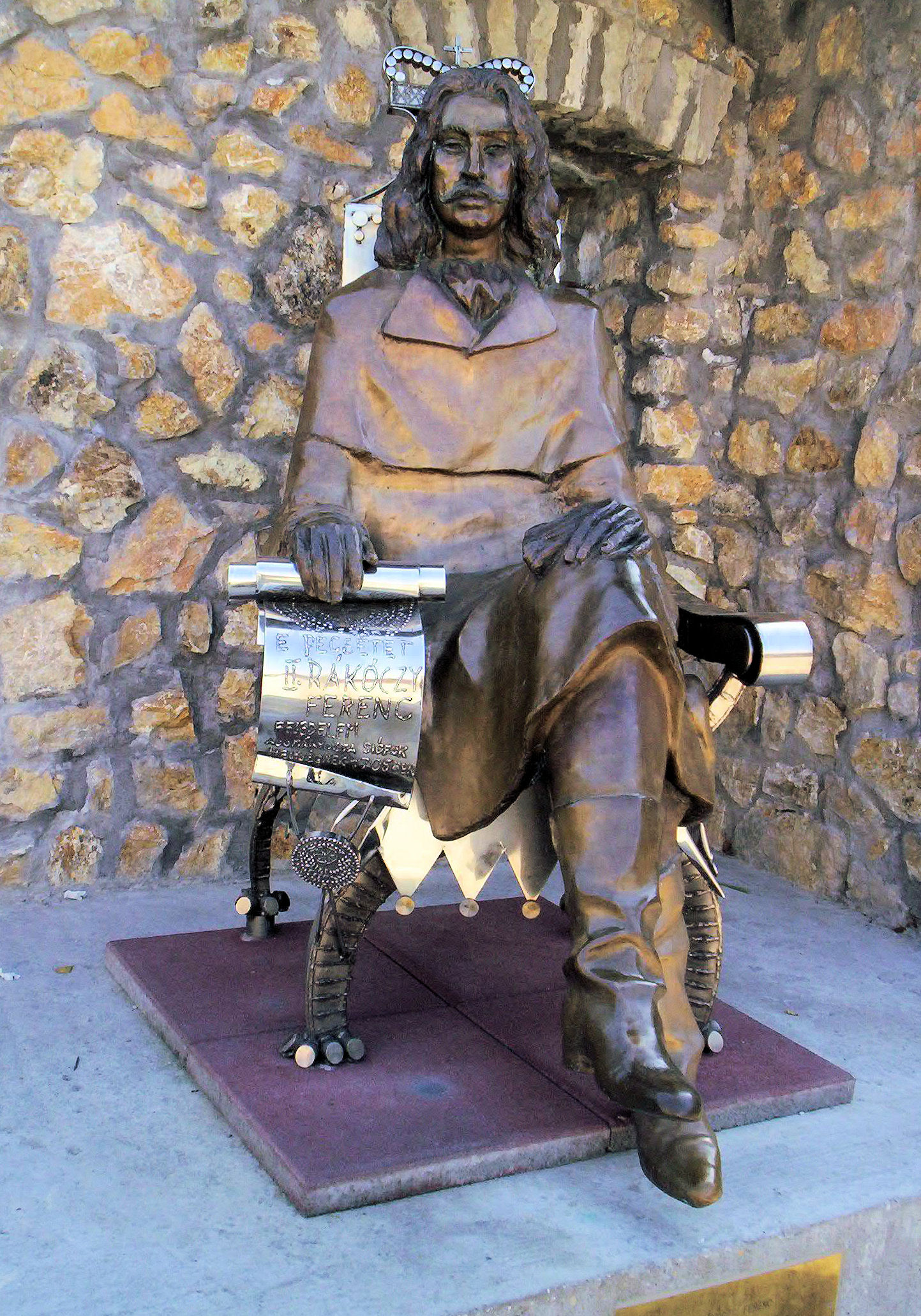 II. Rákóczi Ferenc szobra Siófokon (Varga Imre alkotása) – photo taken by uploader 2005